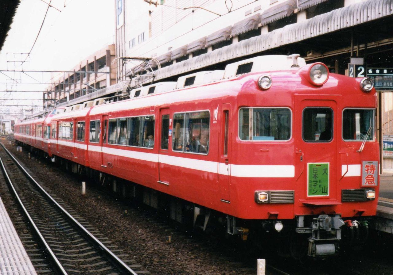 Nagoya Railroad EMU type 7700 At Higashi-Okazaki Sta.